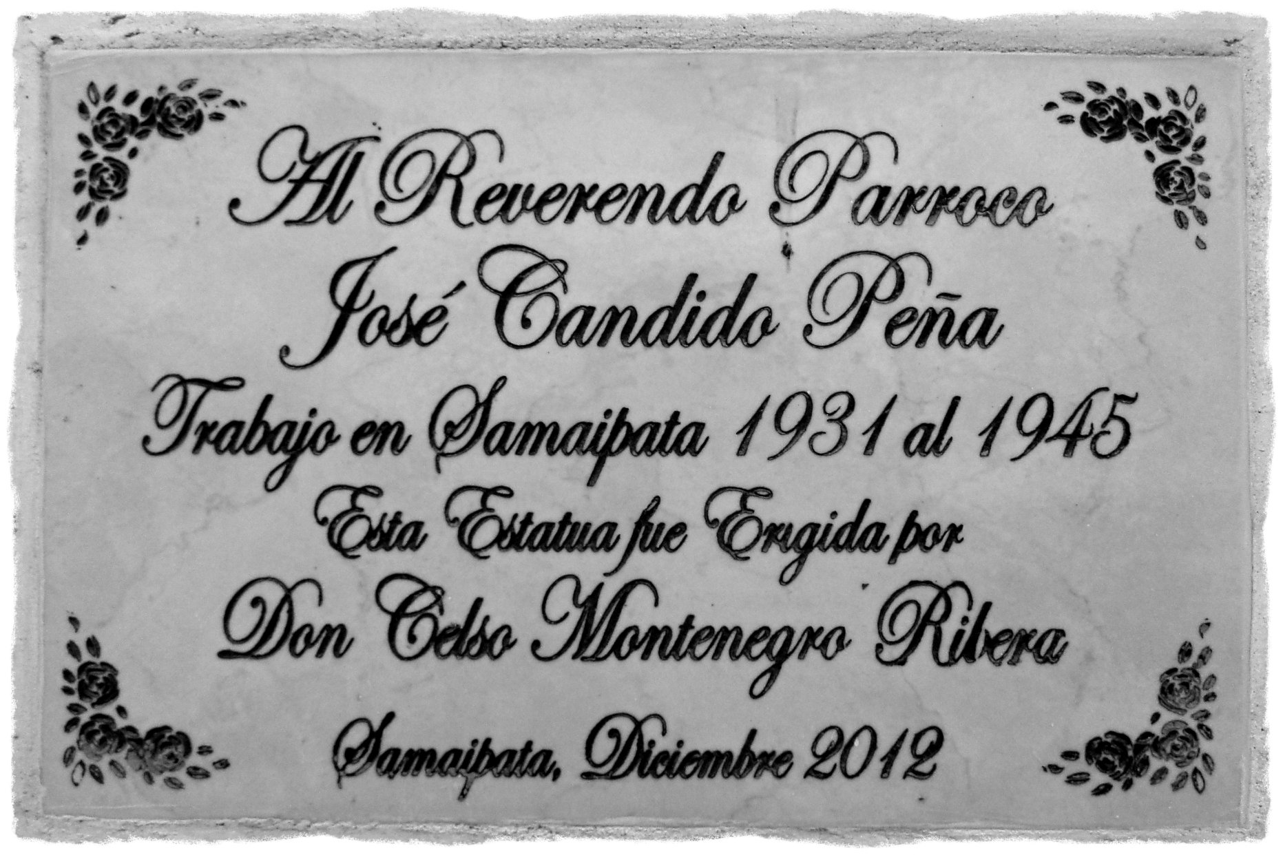 Sacerdote católico boliviano de la región valluna. Fotografía tomada por Javier Siles Balladares en 2013.